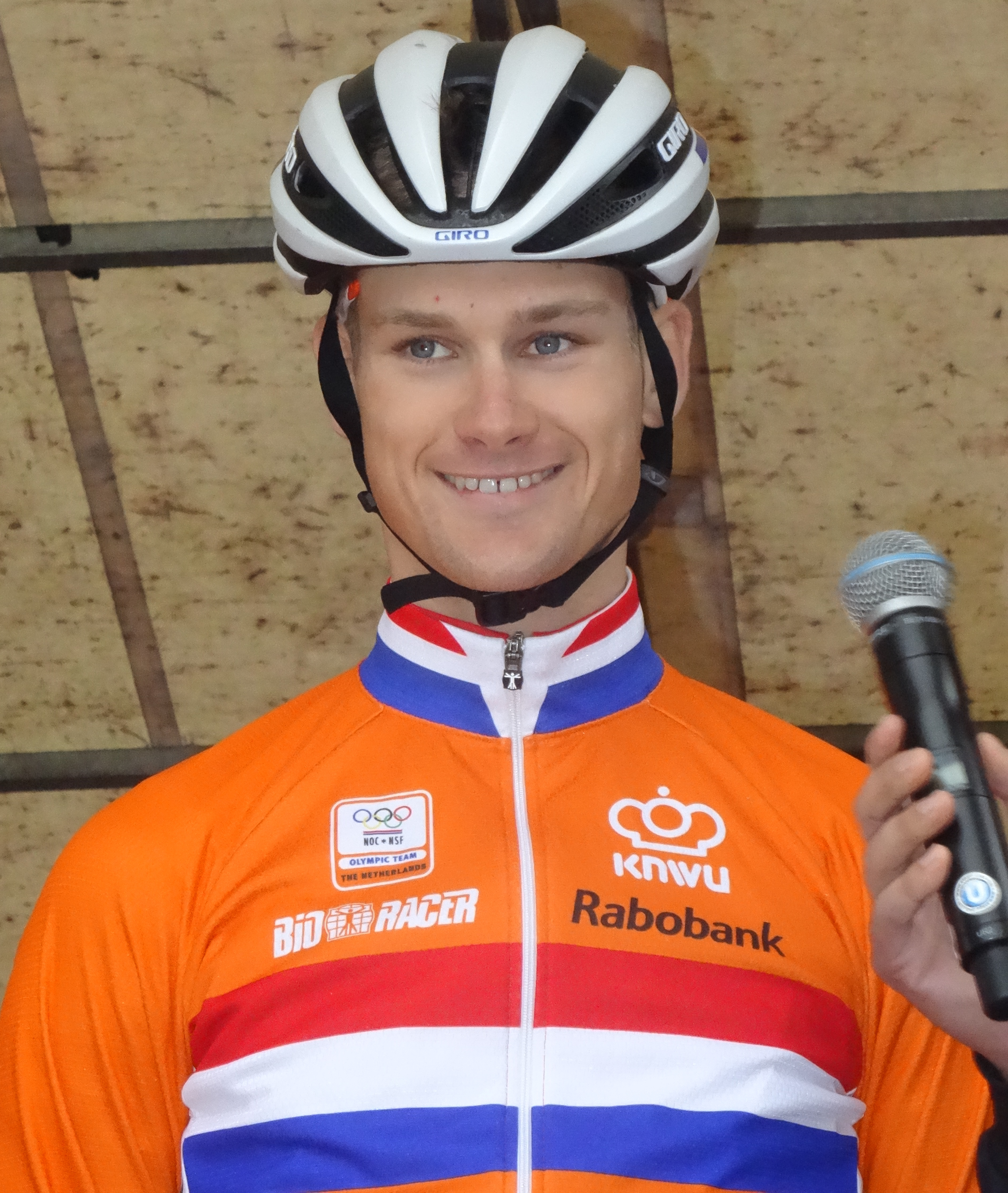 Reportage photographique réalisé le dimanche 14 septembre à l'occasion du départ et de l'arrivée du Grand Prix Jef Scherens 2014 à Louvain, Belgique.